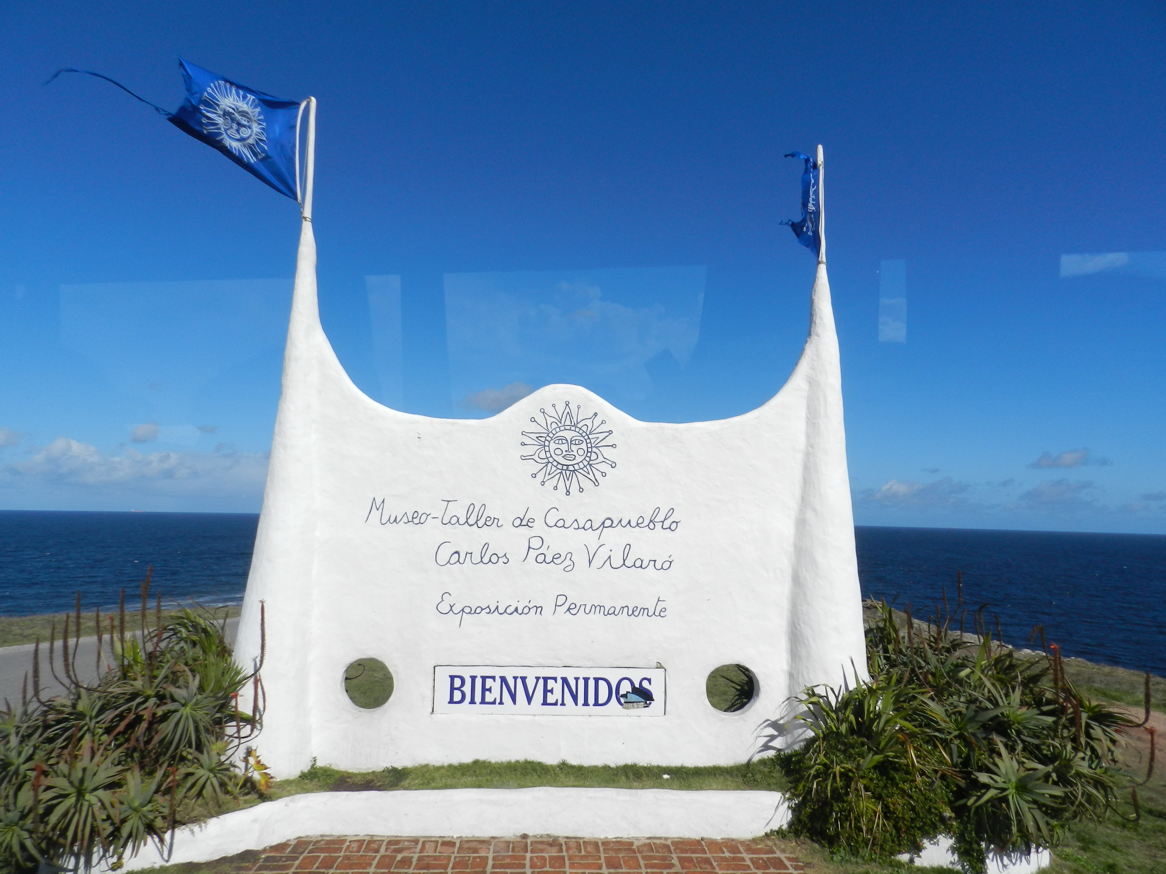 Uruguai - Maldonado - Punta Del Este - Punta Ballena - Piriápolis (Páez Vilaró)